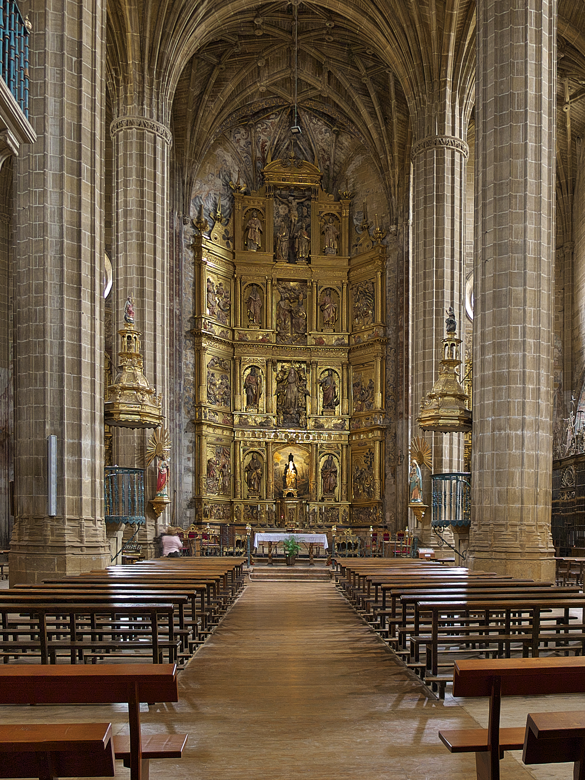 Importante obra en la comunidad riojana. Actualmente se desconoce sus primeras y ambiciosas trazas (1521). El obispo Alonso de Castilla Zúñiga (1523-1541) firma con el maestro de cantería Miguel de Ezquioga un replanteamiento del proyecto con planta de salón, tres naves, capillas, y cinco tramos. Juan Martínez de Mutio continúa la fábrica (1536), que sería terminada por Juan Pérez de Solarte (1565) con el visto bueno de Pedro de Rasines. El retablo mayor de Hernando de Murillas (ca. 1626), con formas manieristas, es admirable.